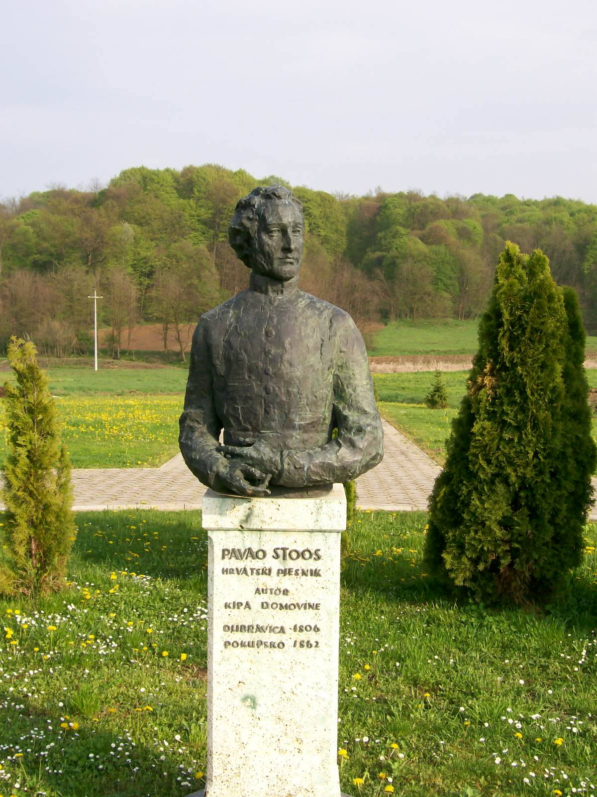 Pavao Štoos, bista u Dubravici pokraj Zagreba